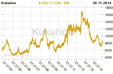 Kukuřice - Cena komodity.